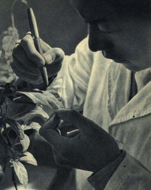 1962-02 1962年 马铃薯病毒鉴定